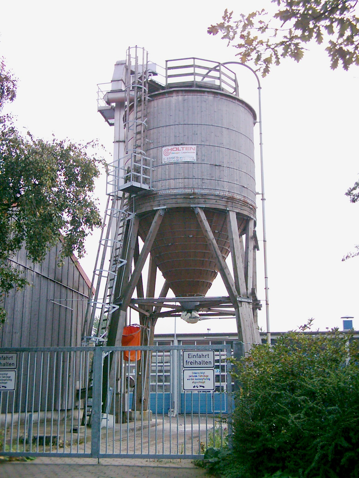 Silo mit Streugut. Stadtreinigung Hamburg, Bullerdeich in Hamburg-Hammerbrook.